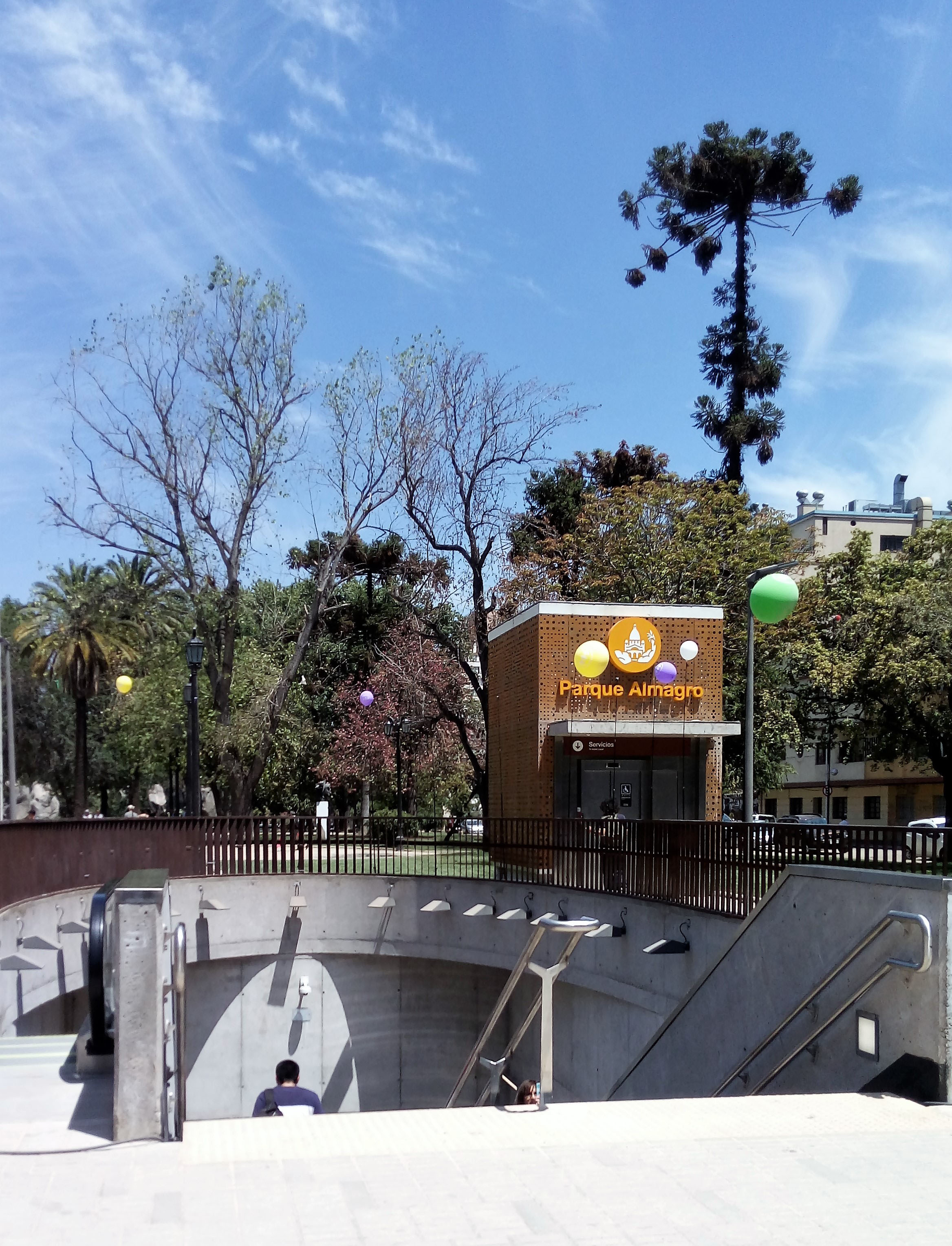 Acceso único a la Estación Parque Almagro de la Línea 3 del Metro de Santiago, en el día de su inauguración.